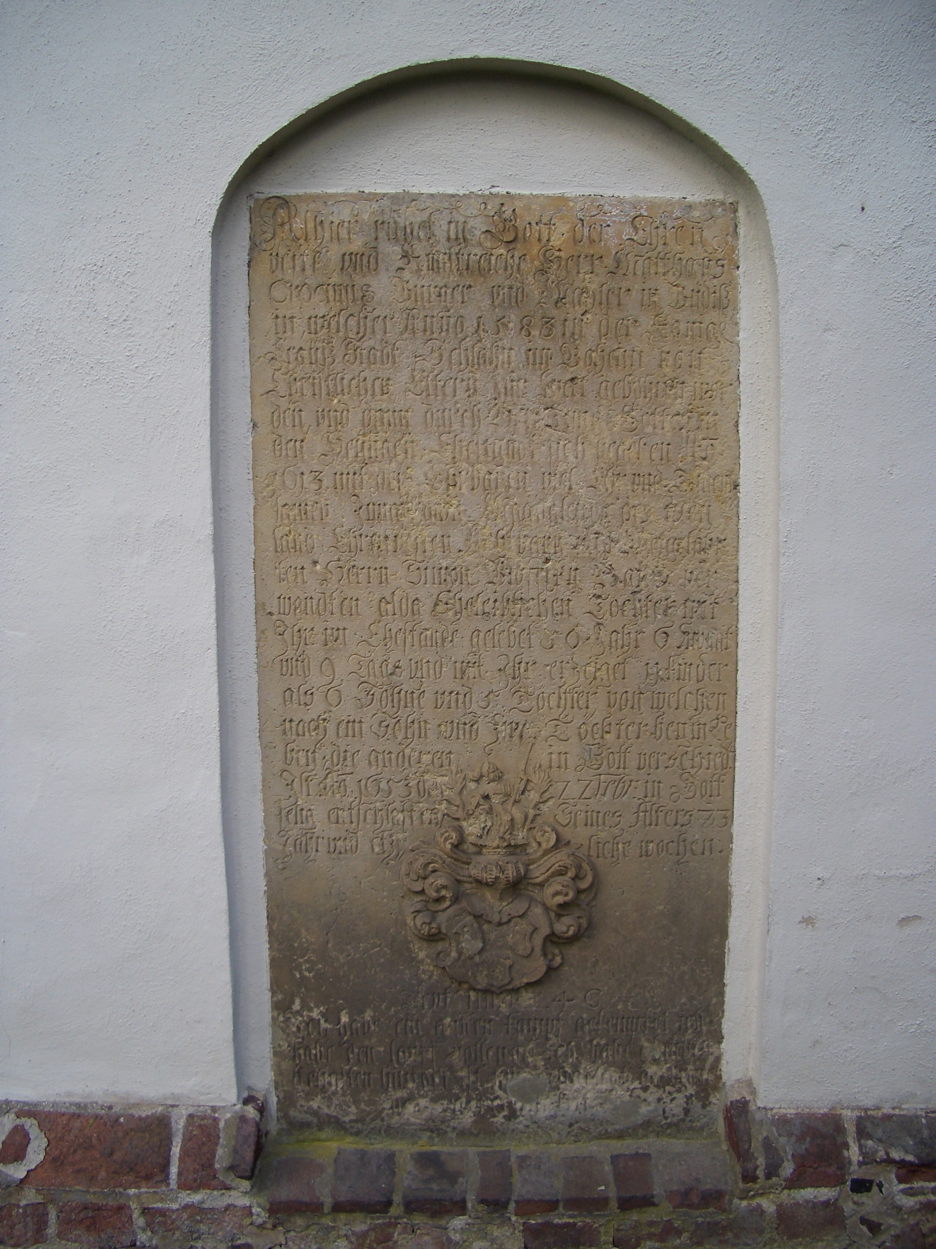 Grabstein von Matthäus Crocinus auf dem Bautzener Taucherfriedhof. Standort am Beinhaus, Siehe den Lageplan File:Taucherfriedhof Lageplan 1909.jpg